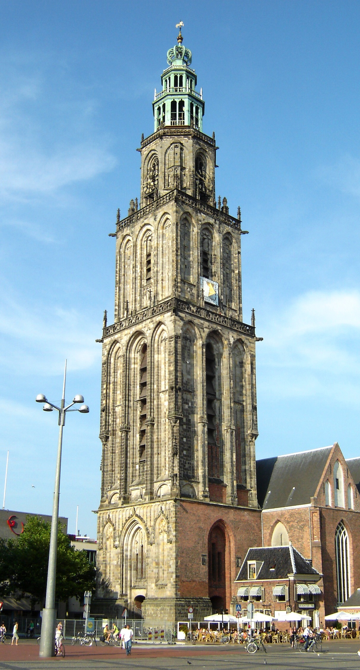 De Martinitoren aan de Grote Markt in Groningen